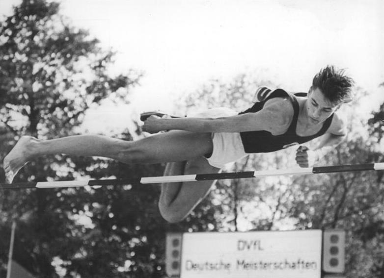 Werner Pfeil Zentralbild Wlocka-Wittig 20.7.58 Wen-L Deutsche Leichtathletik-Meisterschaften vom 18. - 20.7.58 in Jena UBz: Beim Hochsprung holte sich Pfeil den Titel.